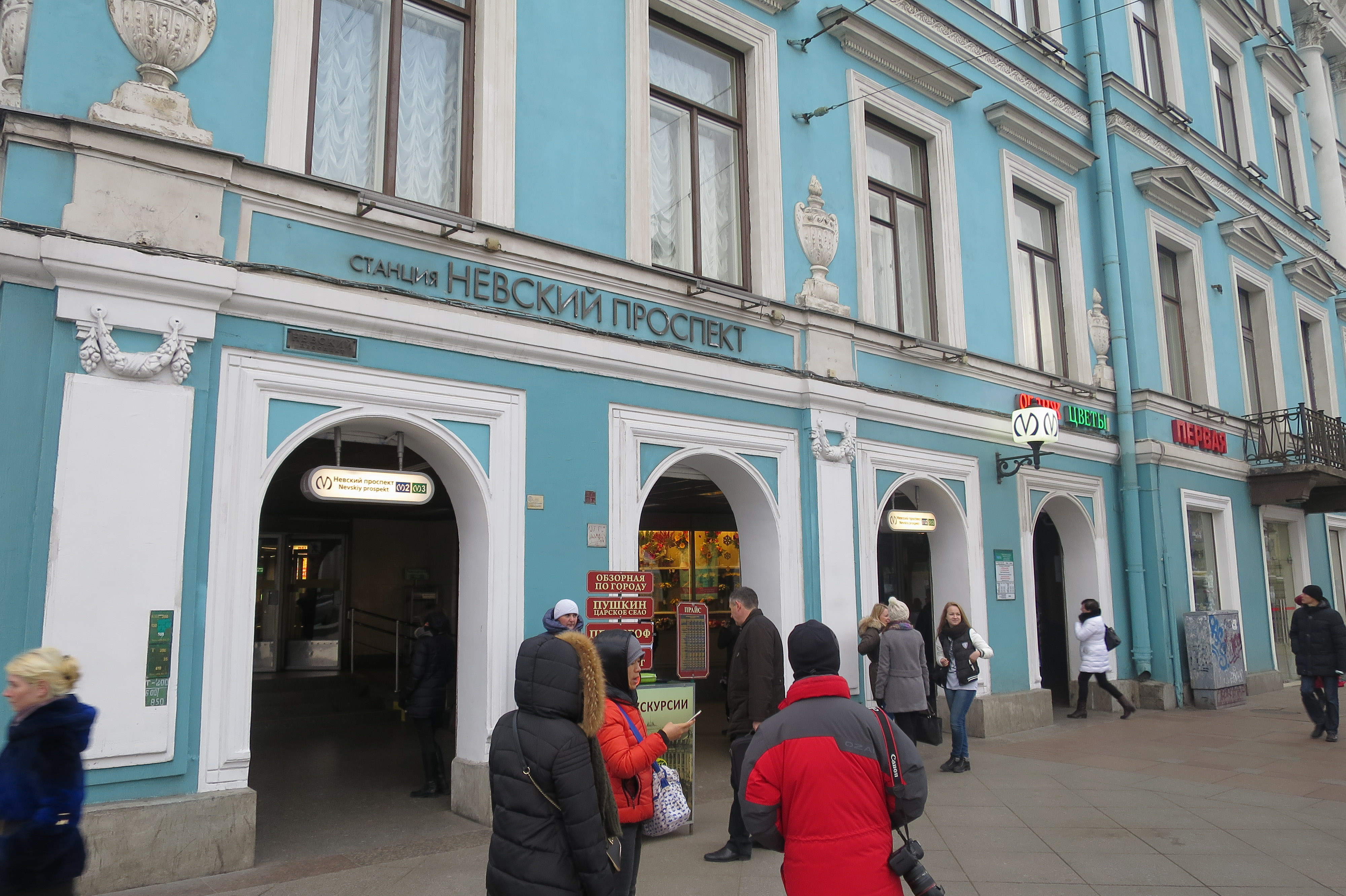 Vue de la station de métro Nevsky Prospekt (Ligne 2) du métro de Saint-Pétersbourg (Russie)